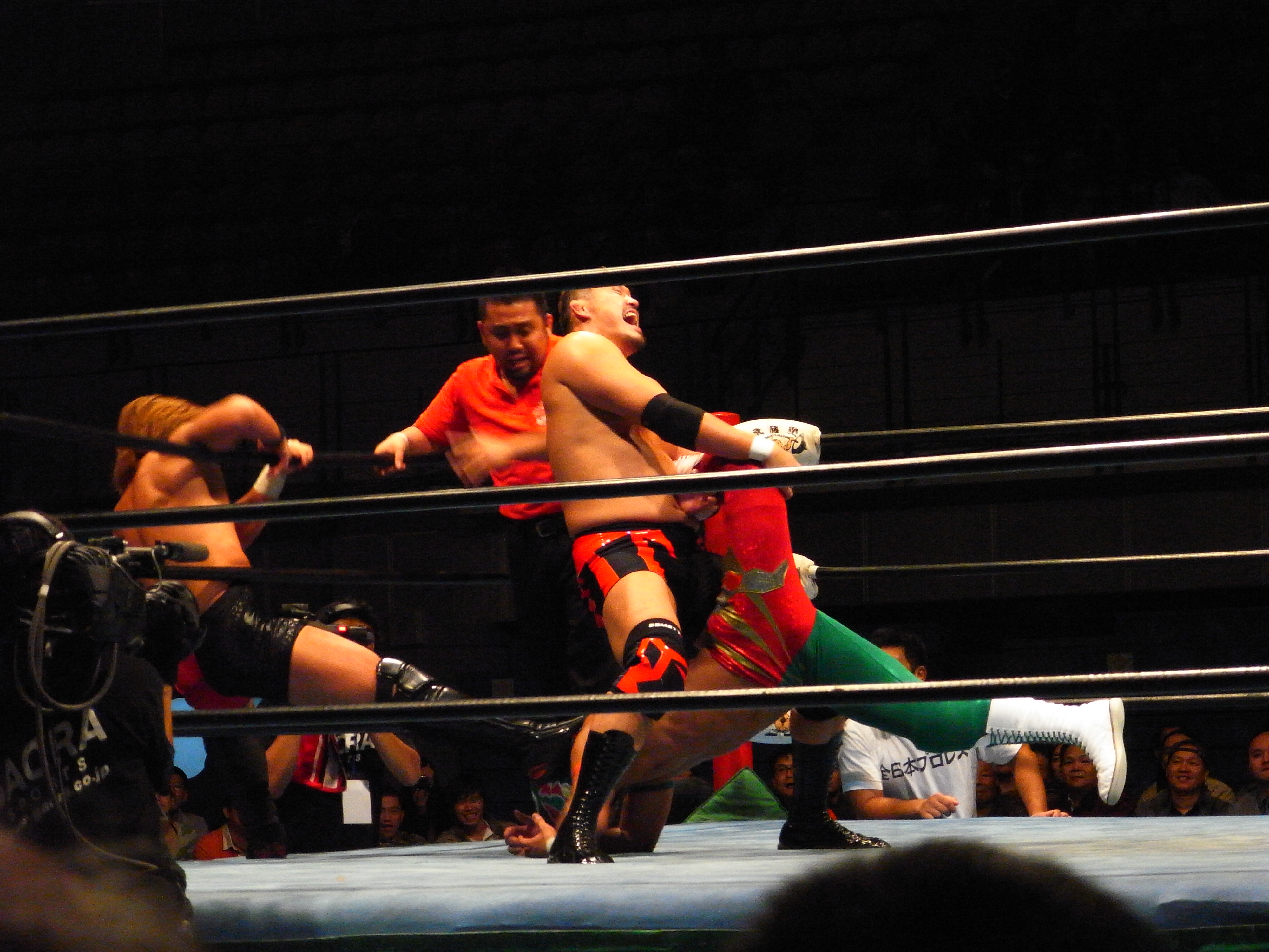 R0014583